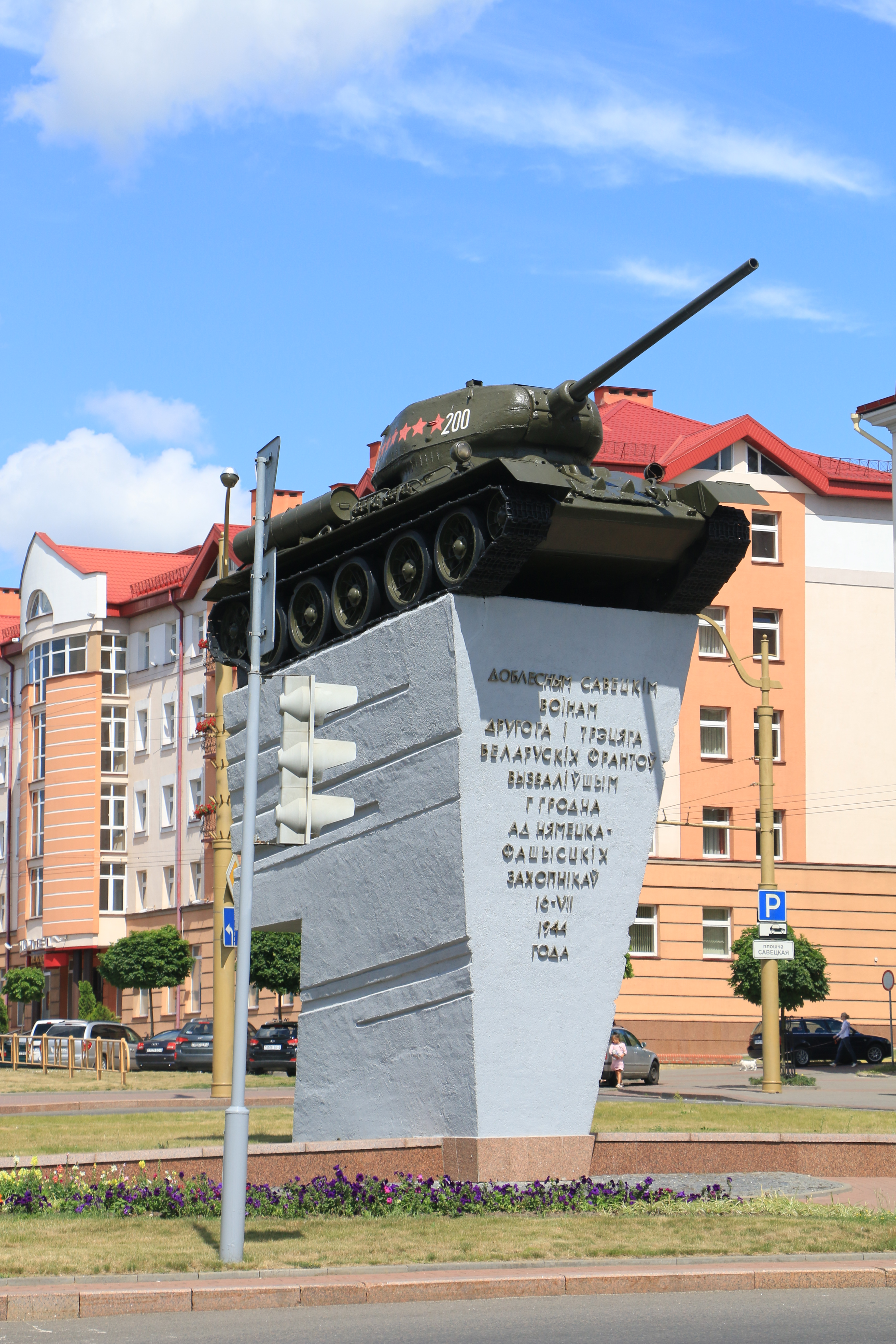 Leninsky, Grodno, Belarus